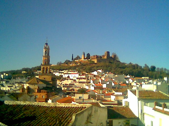 El castillo de Constantina (Sevilla) visto desde la central telefónica.